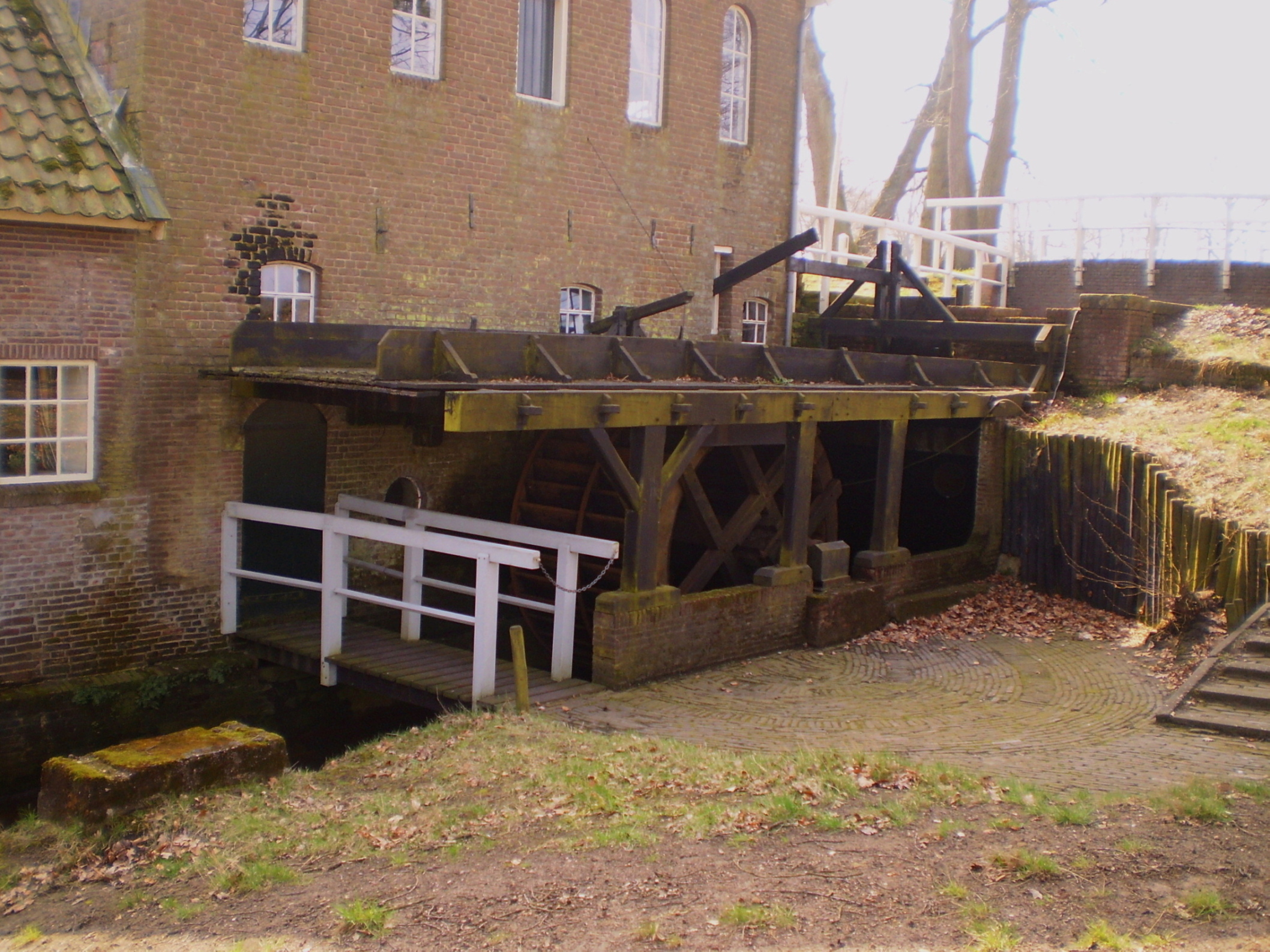 Water mill, Wenum